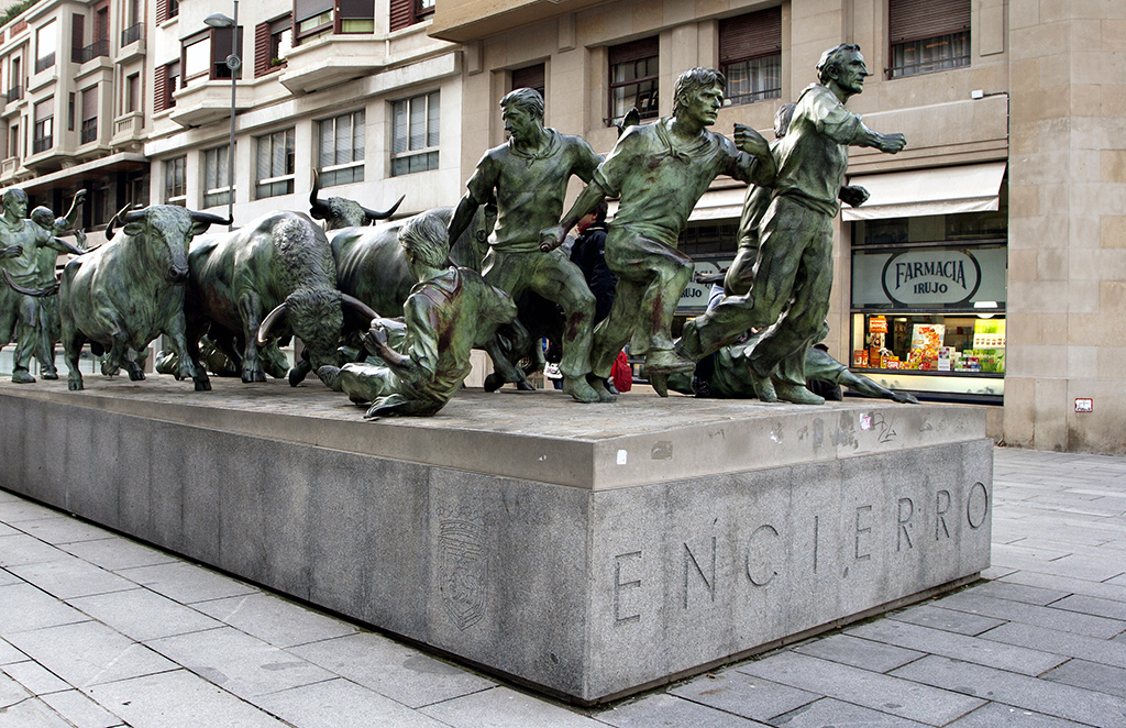 Monumento al Encierro en la ciudad de Pamplona (Navarra, España).